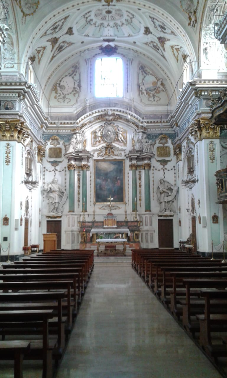 Interni della chiesa di Santa Chiara, fotografati di fronte al portale d'ingresso.